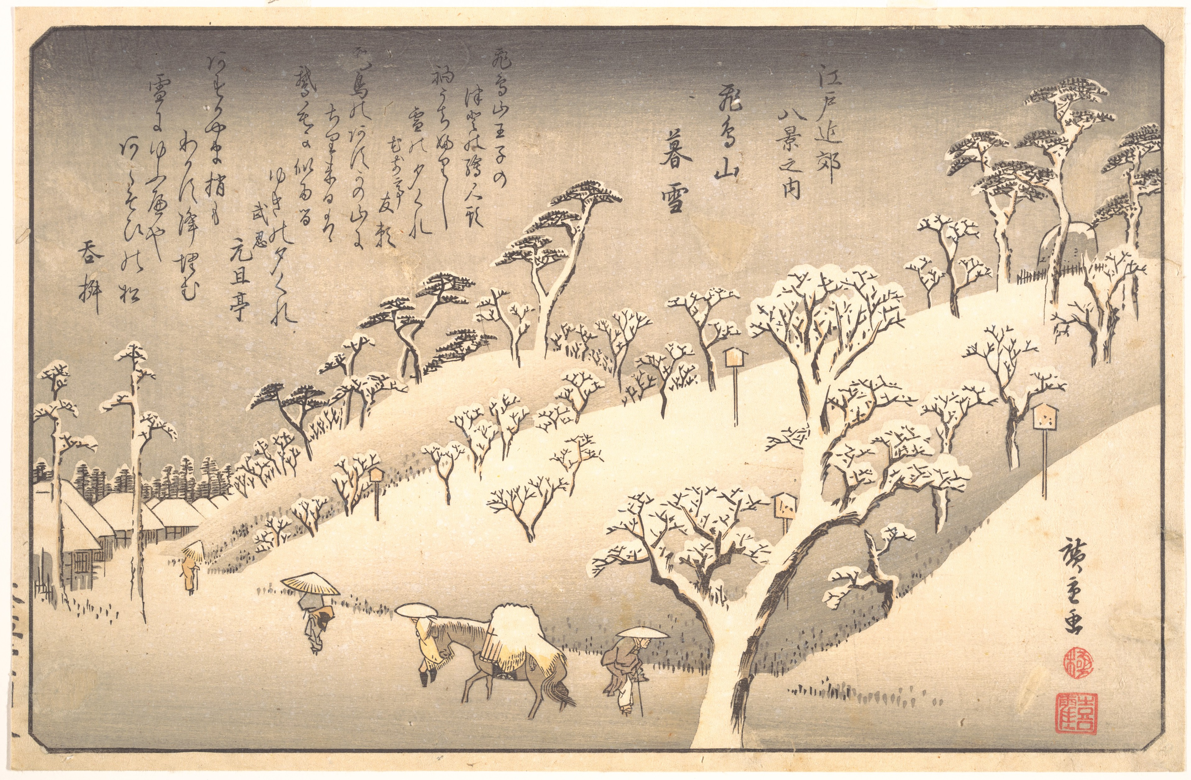 Japan; Print; Prints